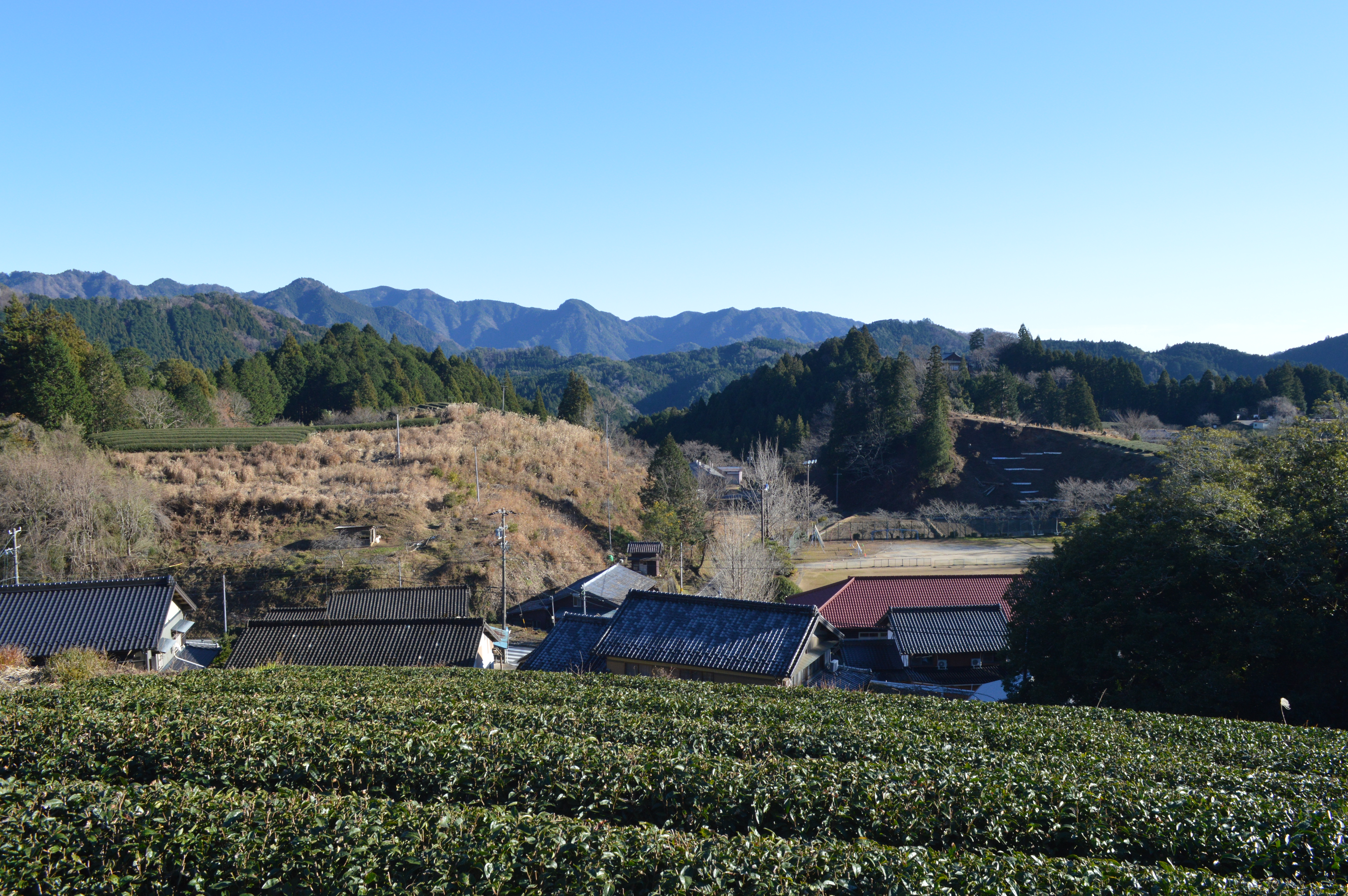 愛知県北設楽郡設楽町の田峯地区。手前は田峯茶の茶畑。